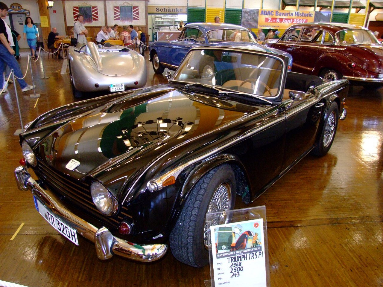 Triumph TR5 PI 2500ccm143PS 1968